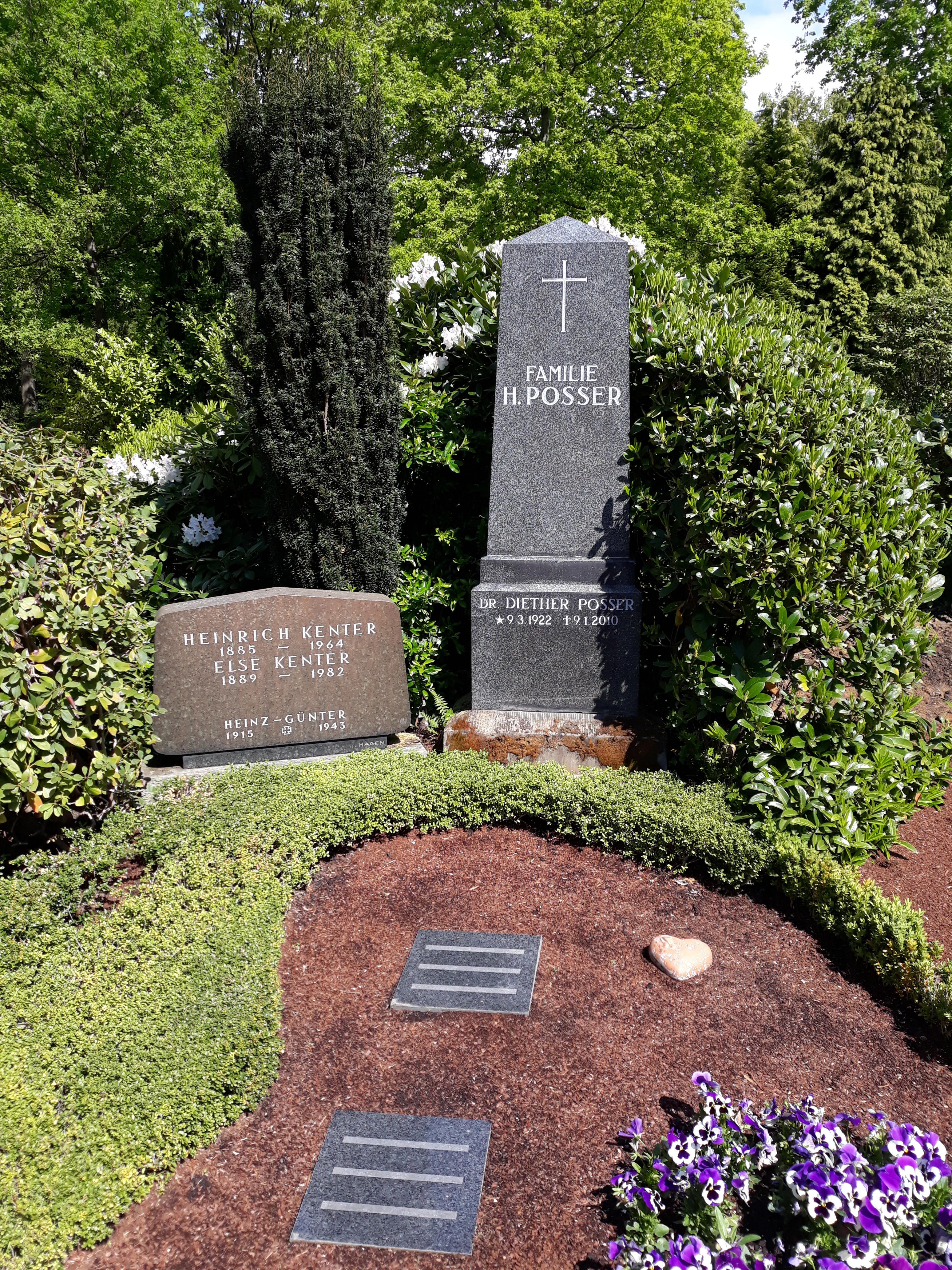 Das Grab des deutschen Politikers Diether Posser im Familiengrab der Schwiegereltern Kenter auf dem Ostfriedhof Essen.